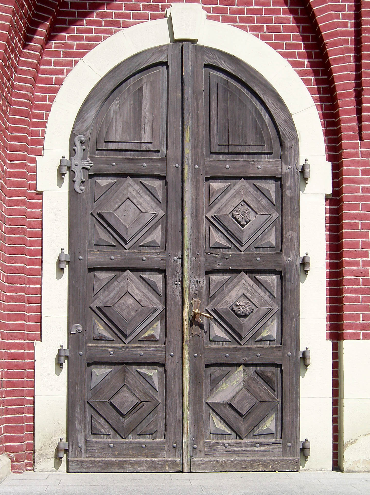 Церква священномученика Йосафата у Львові на вулиці Замарстинівській, 134.